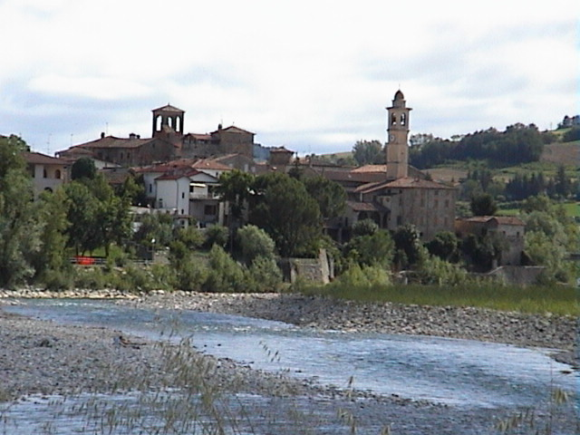 Travo visto da sud sul fiume Trebbia (foto di Archenzo)